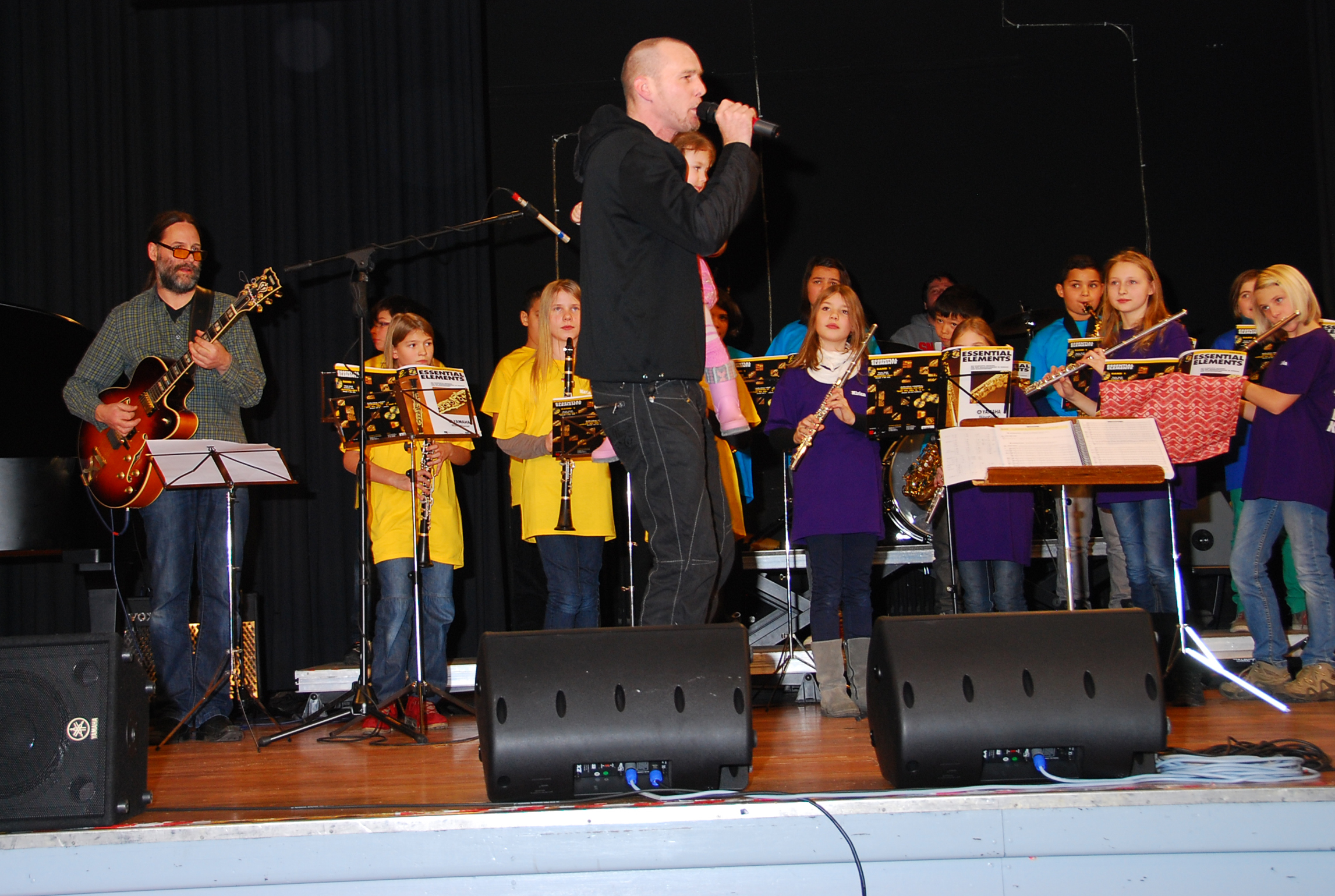 Auftritt der Bläserklasse des Gymnasiums Neue Oberschule mit der Jazzkantine